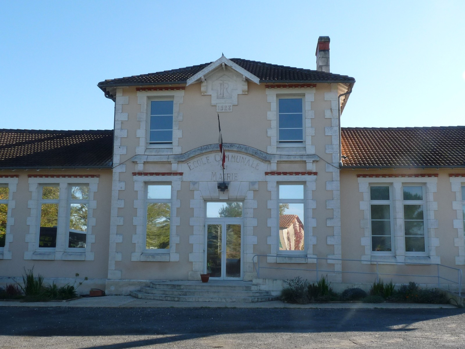 Mairie de Saint-Pierre-du-Palais, Charente-Maritime, France